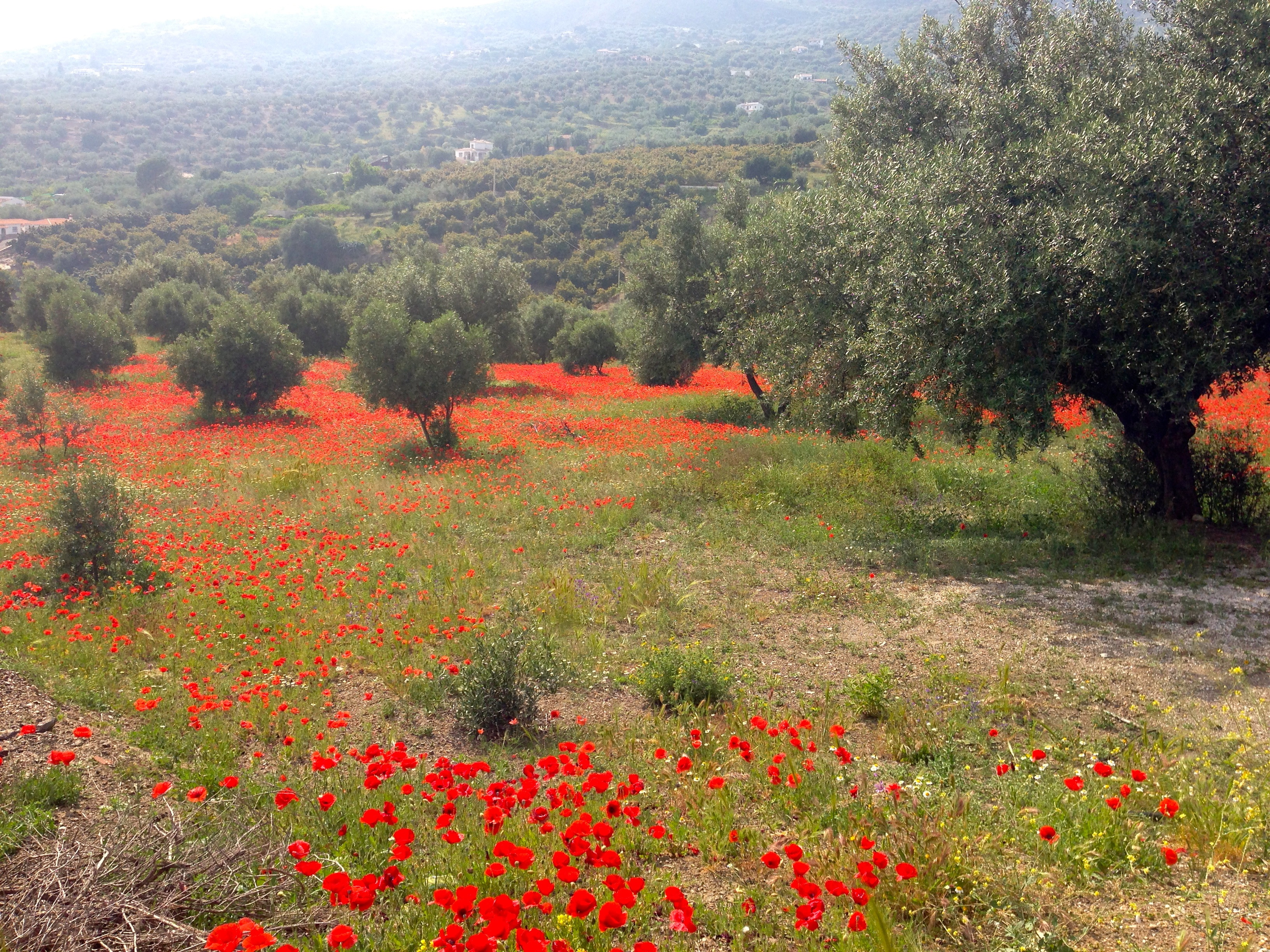 Sierras de Tejeda, Almijara y Alhama Natural Park